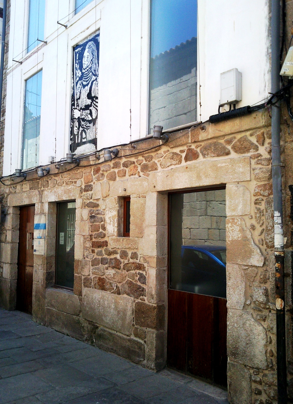 Museo María Pita